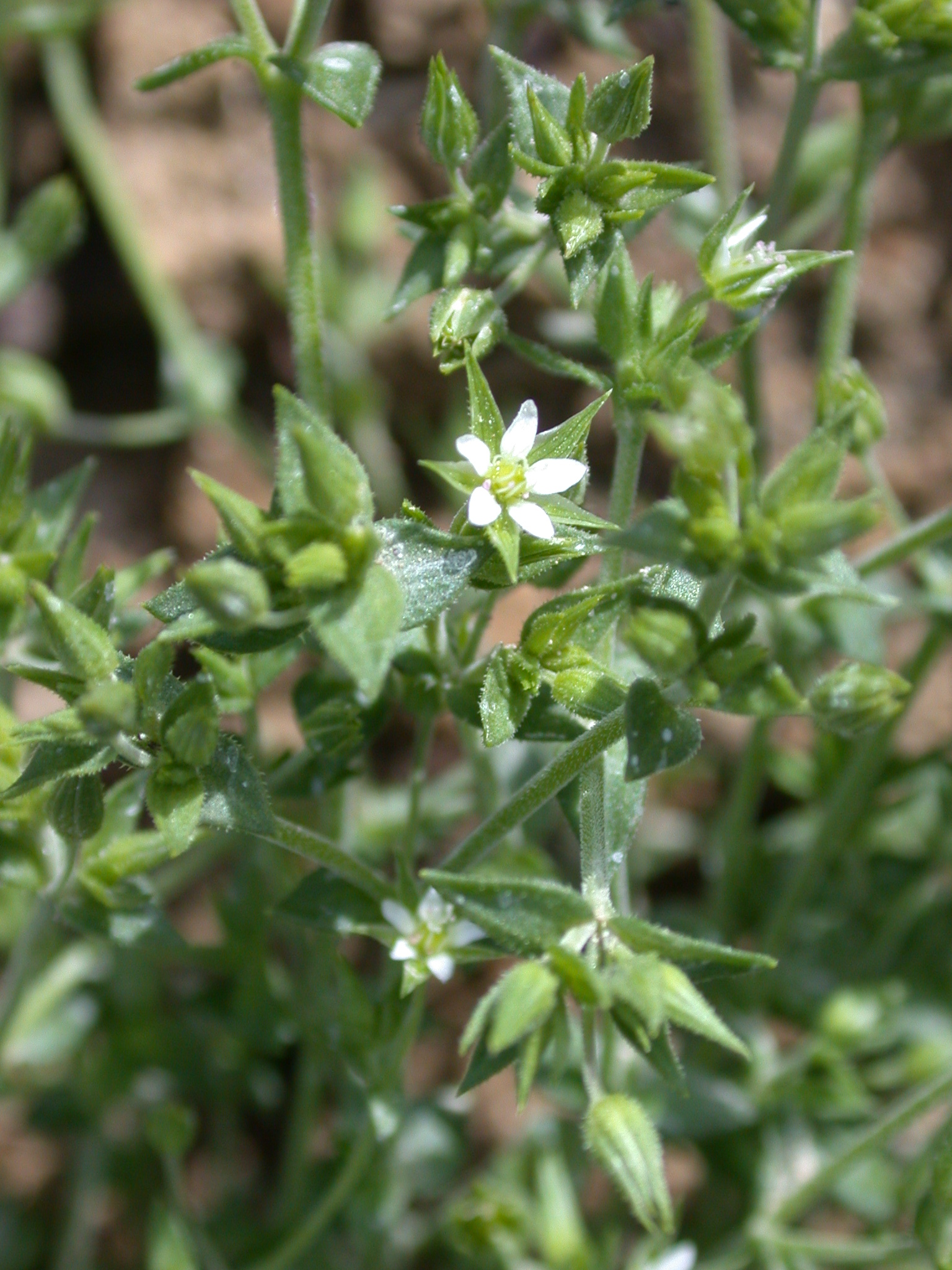 Arenaria serpyllifolia-ssp-leptoclados Brasles (Aisne), France